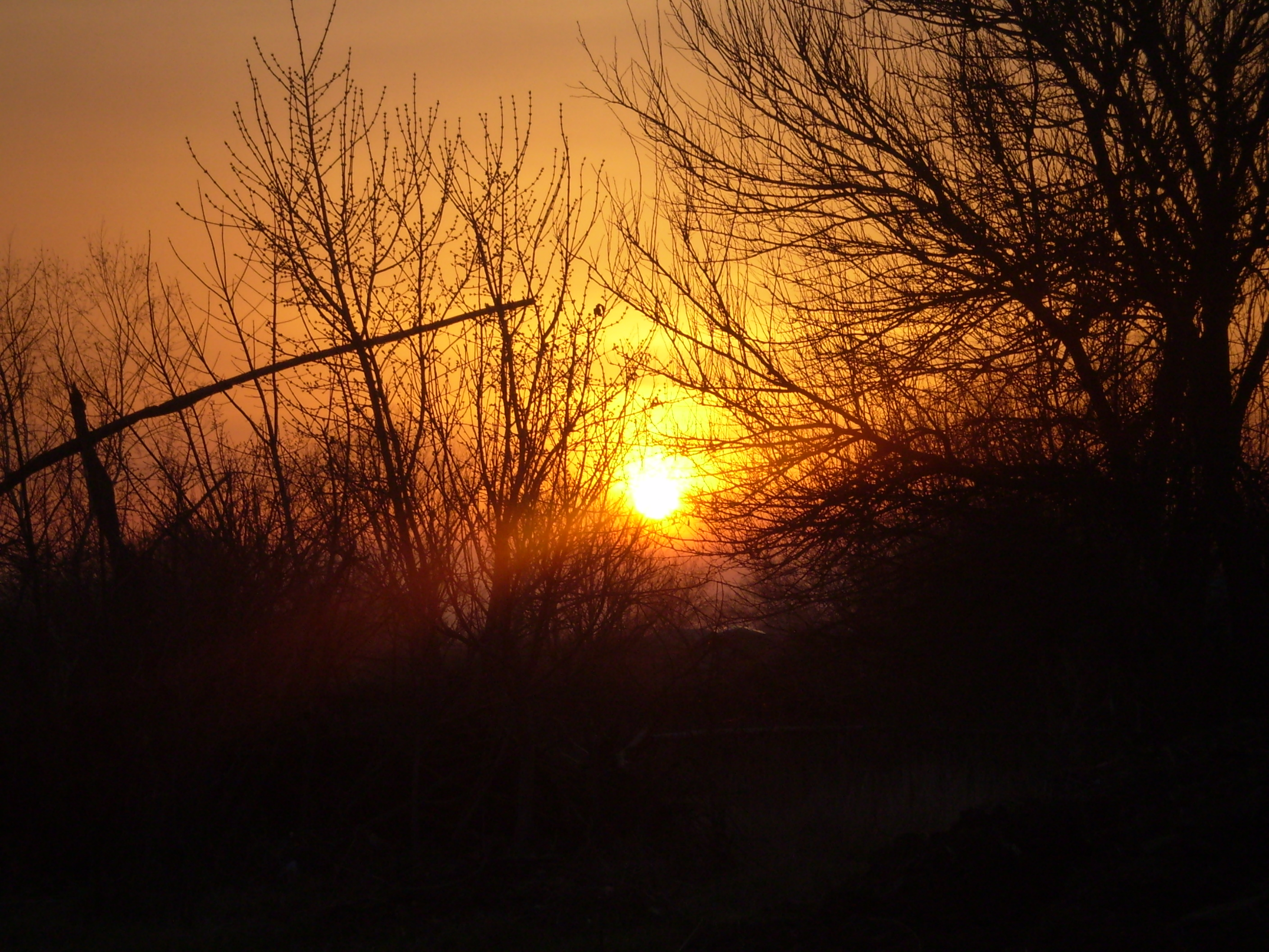 відділення «Стрільцівський степ», Міловський район, с. Великоцьк